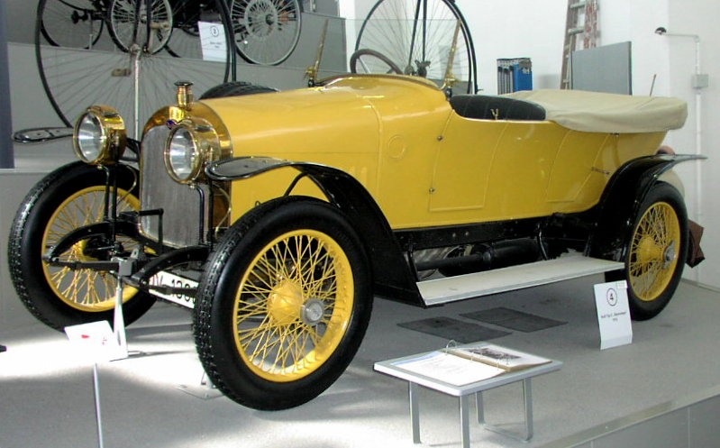 Audi Type C Alpensieger (1914)